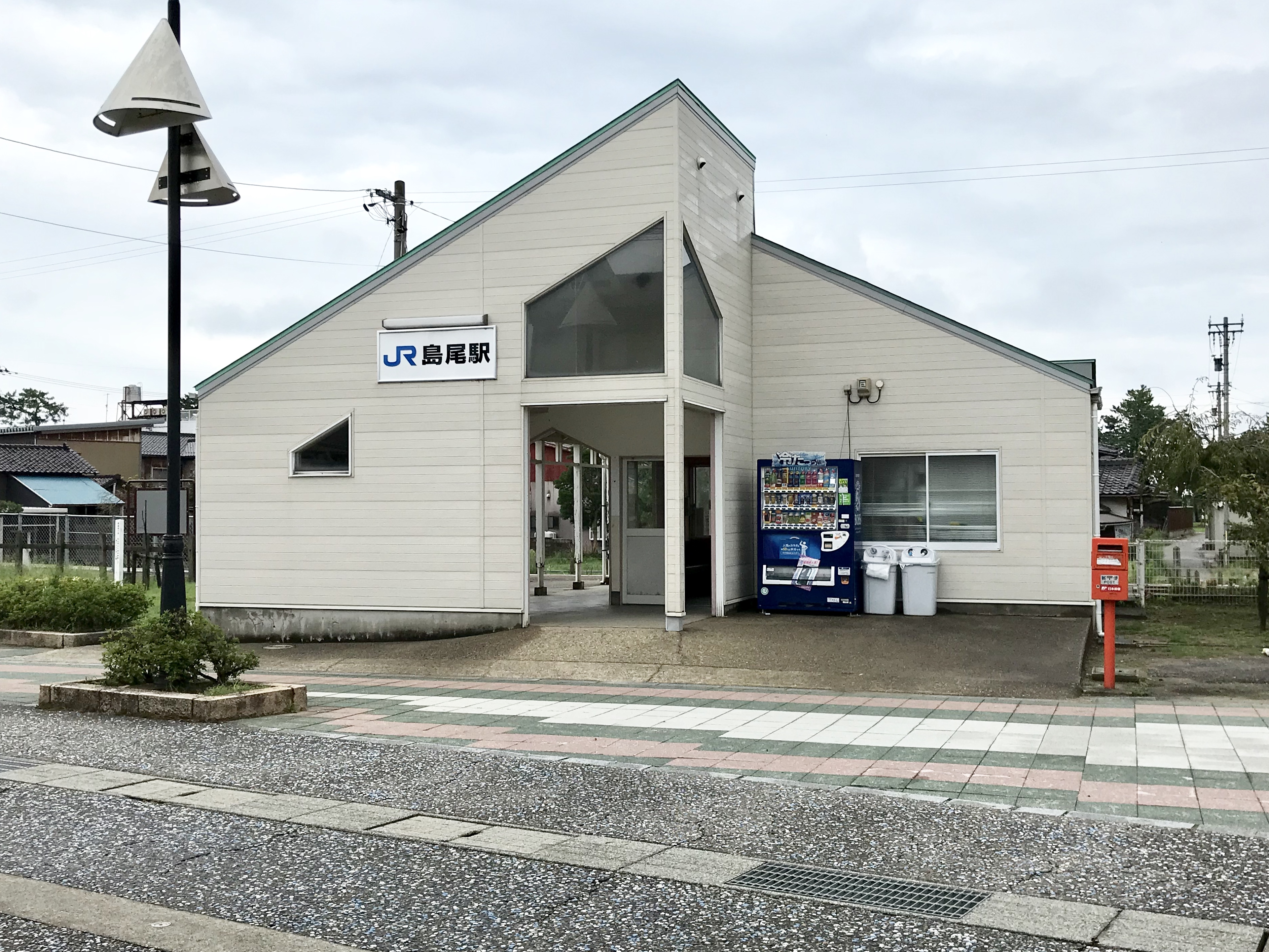 JR西日本氷見線島尾駅駅舎